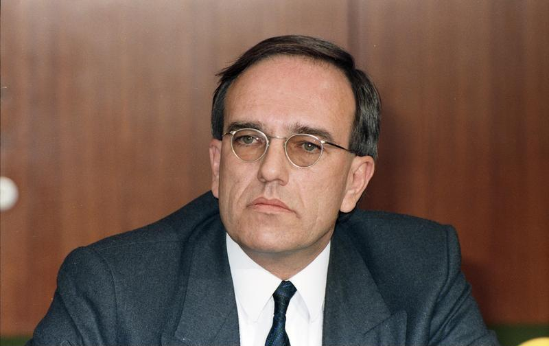 Pressekonferenz des Vorsitzenden der CDU-Sozialausschüsse und Berliner Senators für Gesundheit und Soziales, Ulf Fink, zur Politik der CDU im Konrad-Adenauer-Haus. 30.3.1988